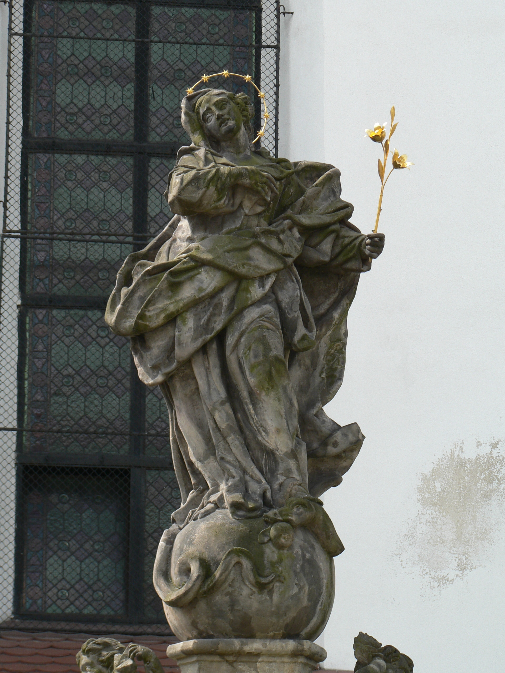 Socha Panny Marie Immaculaty v Bruntále z 30. let 18. století, Filip Sattler